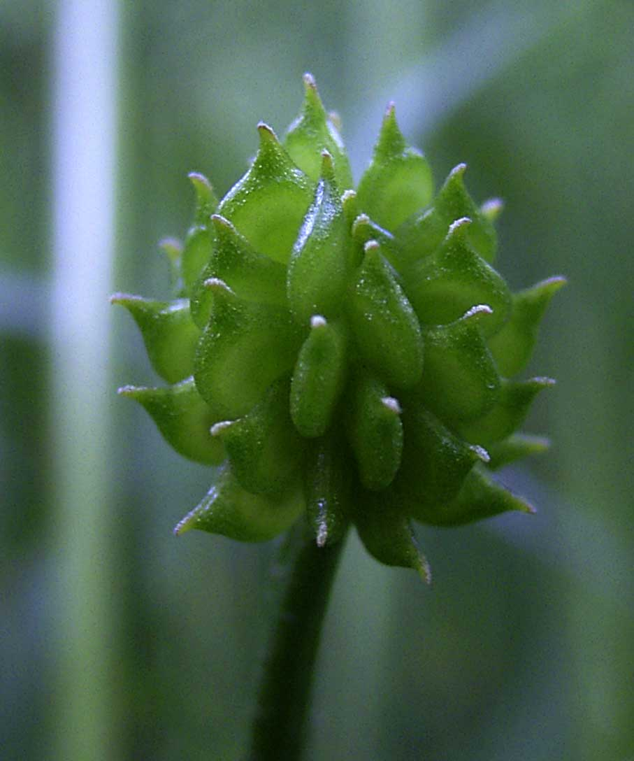 Fruchtstand des scharfen Hahnenfuß. Feuchtwiese Boden im Lottental bei Bochum Aufnahme vom 24.05.05